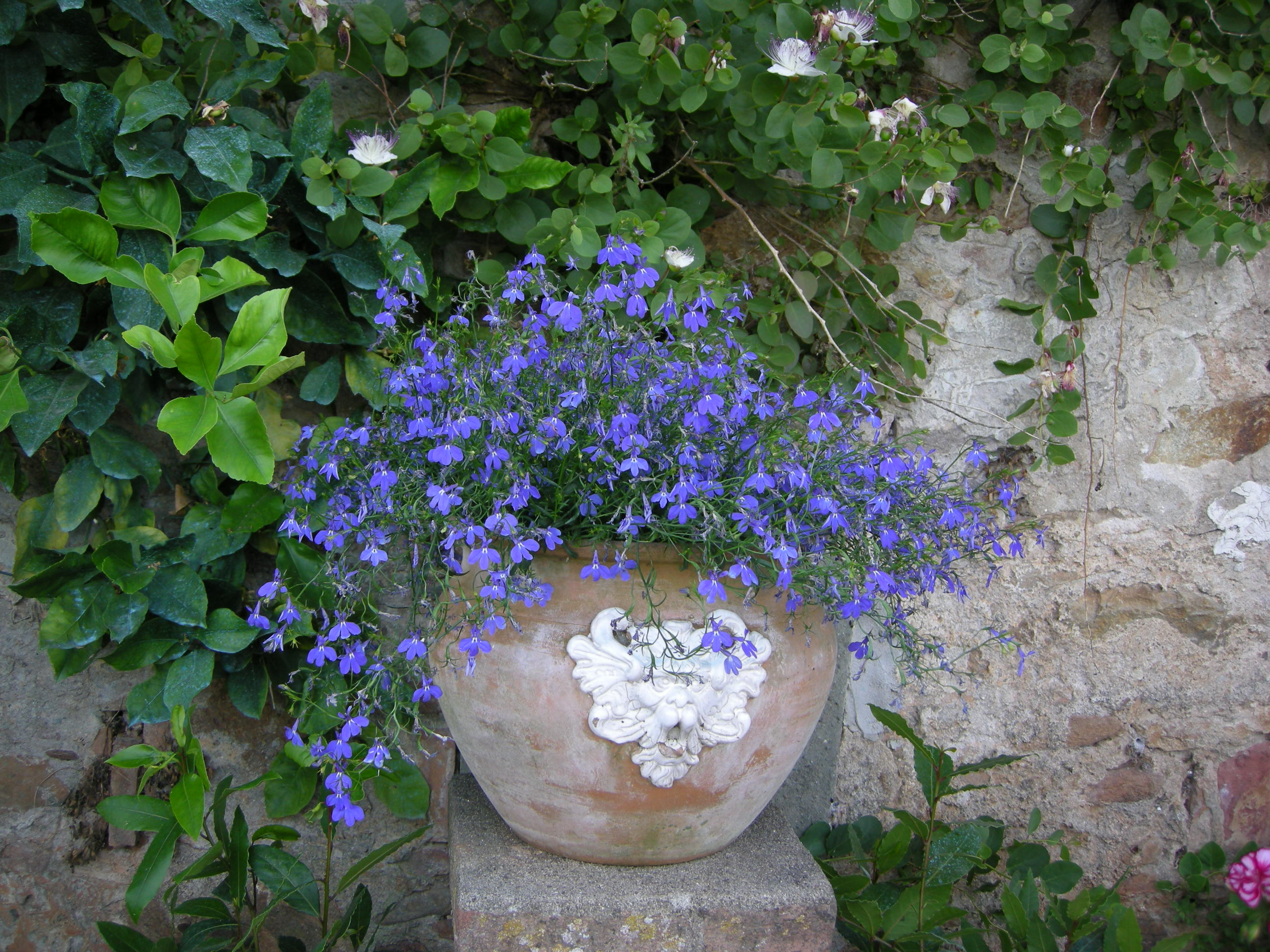 Villa ruschi, giardino